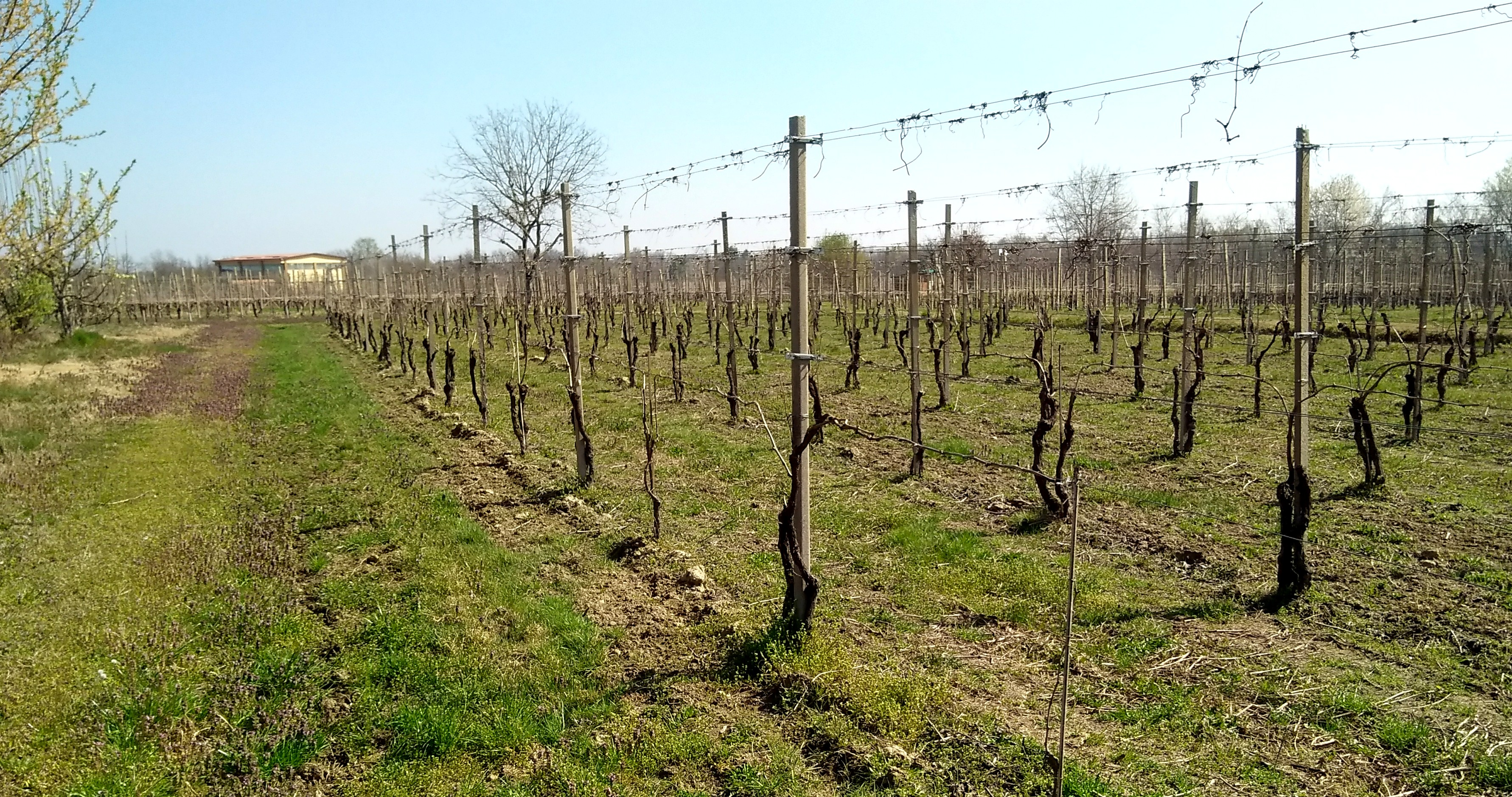 Una vigna a Briona (NO), zona di produzione dei vini "Colline Novaresi DOC"